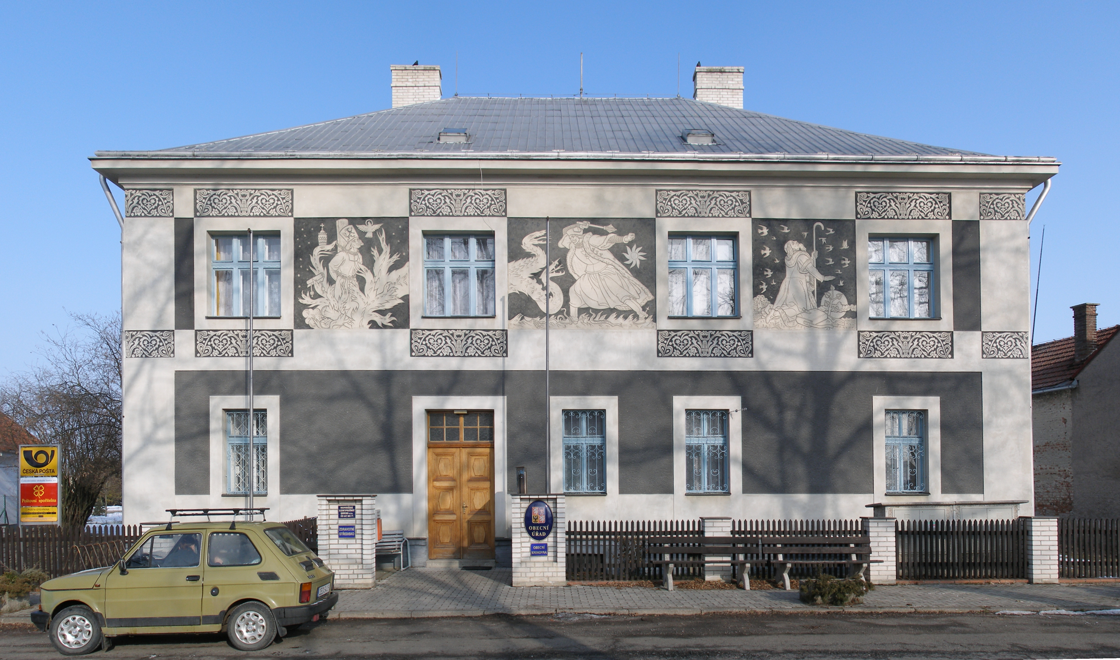 Obecní úřad a pošta v obci Uhersko (Okres Pardubice). Sgrafita místního rodáka A.Mudruňky z let 1926 - 1927.